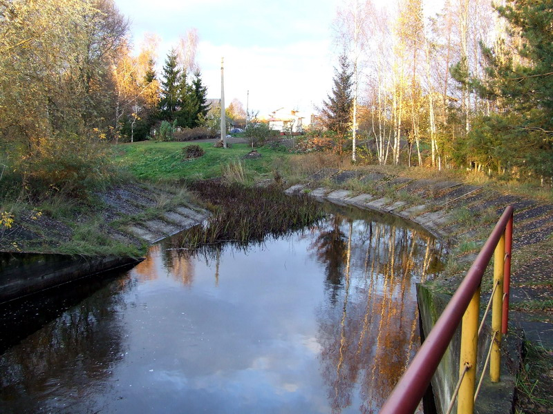 Juoda už Staniūnų tvenkinio, Panevėžio raj.